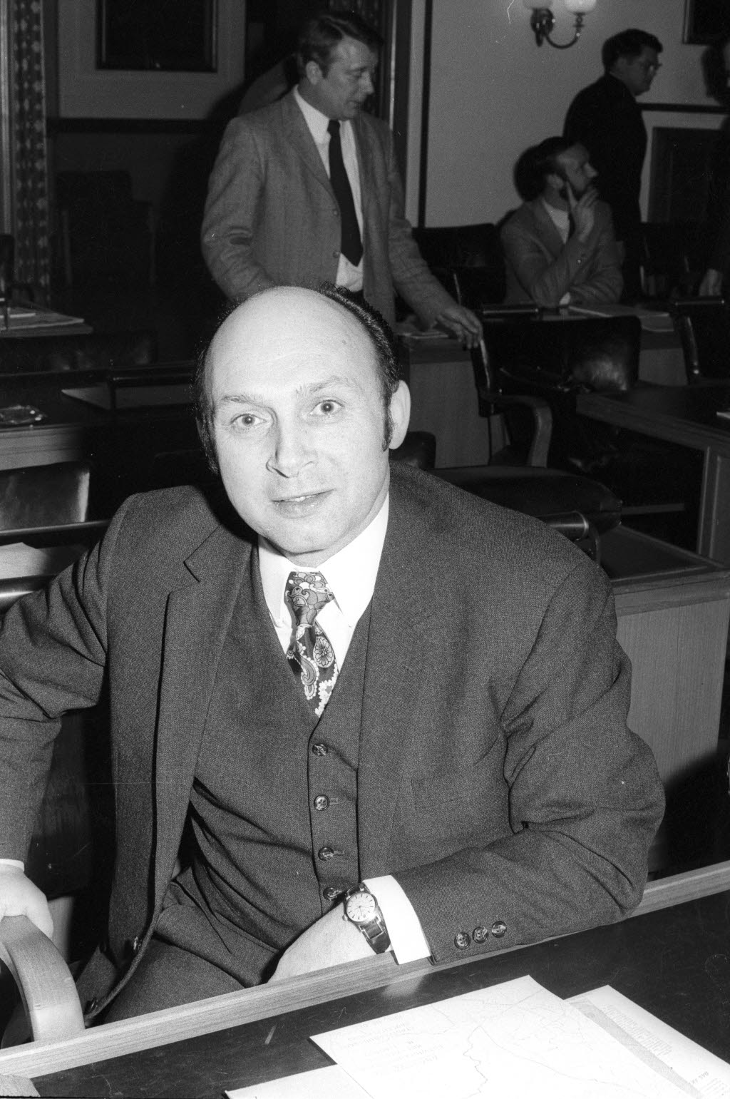 während der Ratssitzung im Januar.